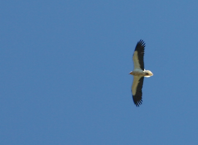 Capovaccaio (Neophron percnopterus) Bosco della Ficuzza, Sicily